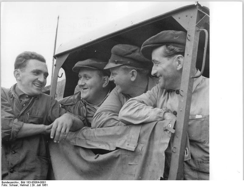 Zentralbild Schaar 29.7.1961 Wettbewerb der Mts-Jugendbrigade Die MTS-Jugendbrigade "Ruth Krannich", Stützpunkt Großbreitenbach, steht im Wettbewerb der Mts-Jugendbrigade des Bezirkes Suhl wieder mit an der Spitze. Die jungen Traktoristen unternehmen alle Anstrengungen, um im Besitz der Wanderfahne für die beste Mts-Jugendbrigade zu bleiben. Den Halbjahplan konnten sie mit 113,3 Prozent erfüllen und in diesem Zeitraum 76743.- Dm Kosten einsparen. UBz: Traktorist Reinhard Möller, Brigardier Klaus Starick, Traktorist Wilfried Linke und Werdstattschlosser Karl Bulle, Mitglied der Brigade (v.l.n.r.) im Gespräch